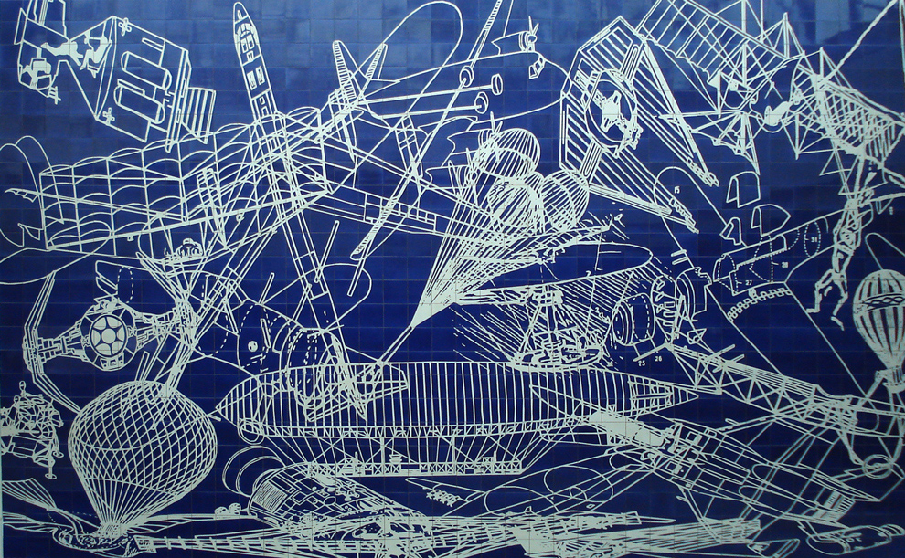 Ex Orbis, painel de azulejos pintados sobre o tema da história da aviação no aeroporto de Porto Alegre